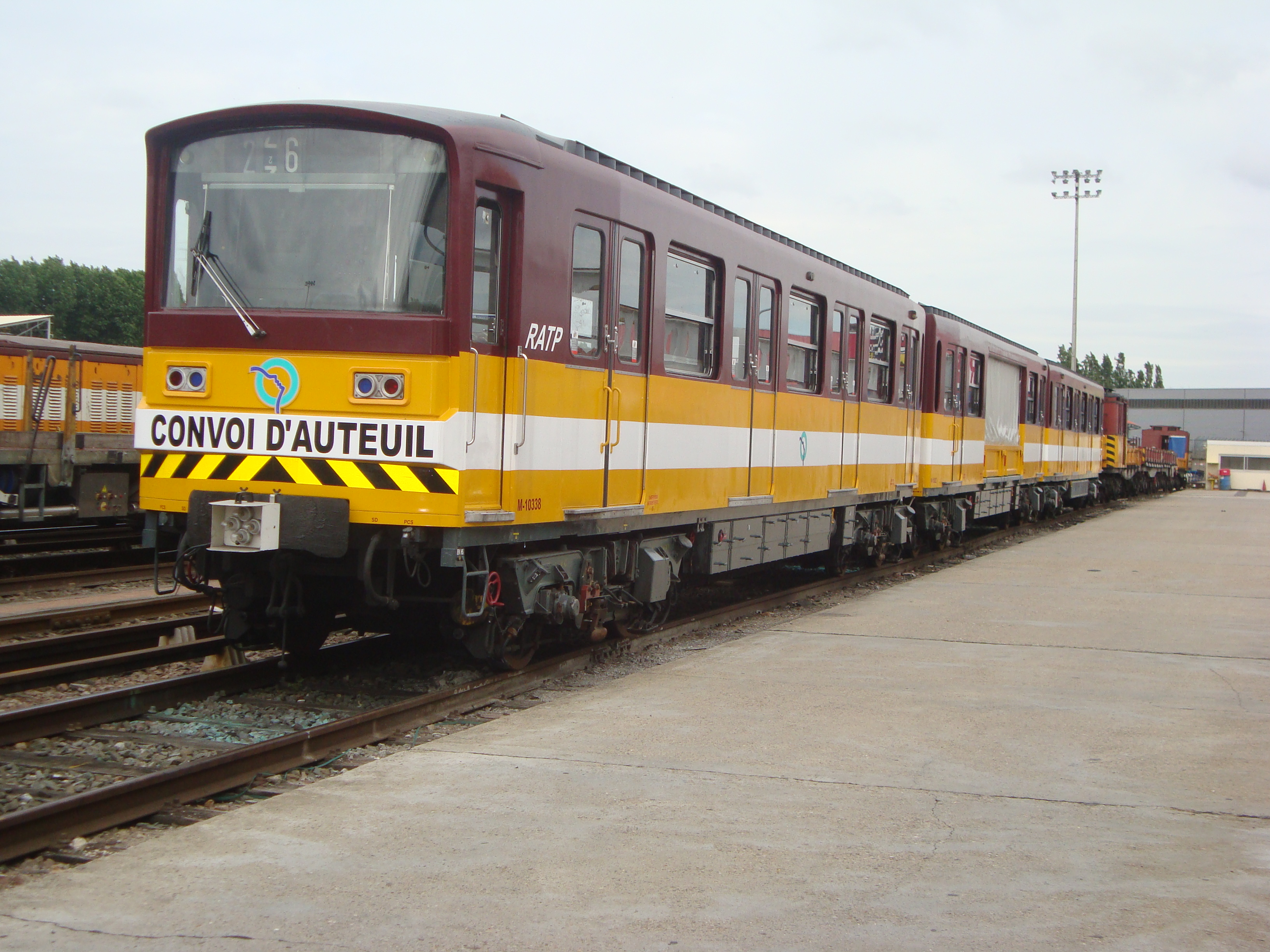 Le Convoi d'Auteuil dans les ateliers du métro de La Villette.